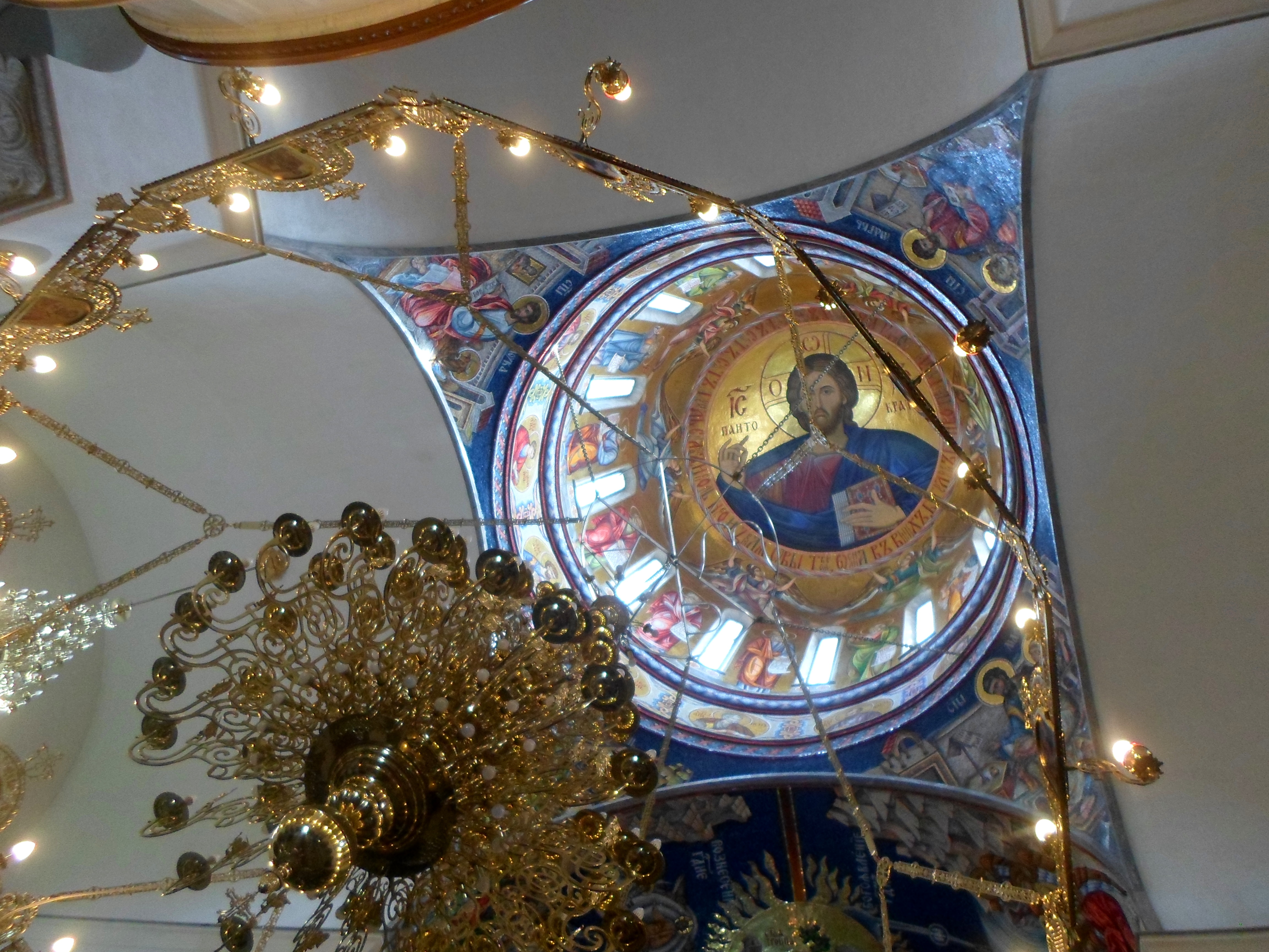 Saborni hram Hrista Spasitelja u Banjoj Luci This image was uploaded as part of Trace of Soul 2016.